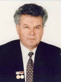 Овчарук Анатолій Миколайович — академік АН вищої школи України